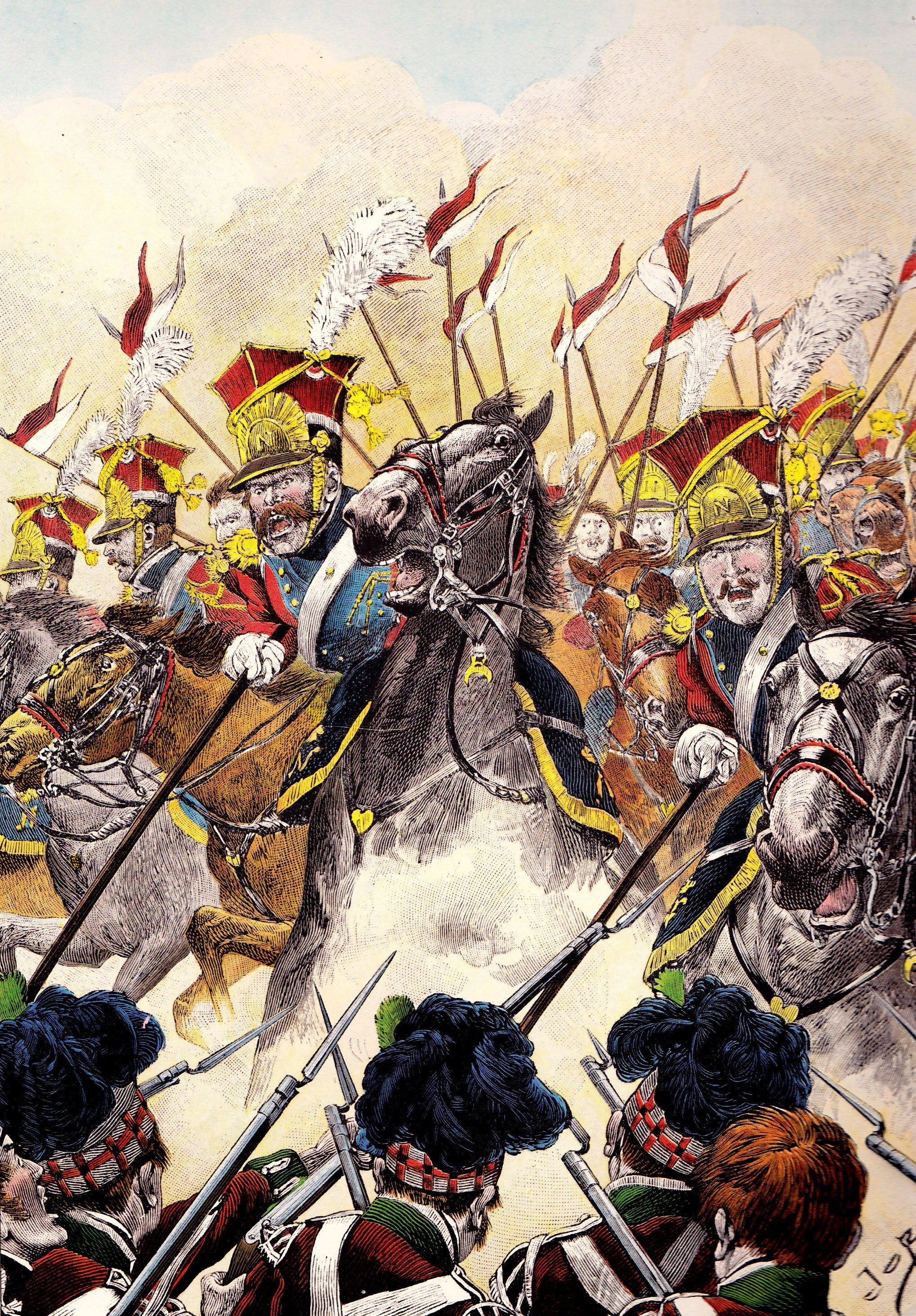 Charge des lanciers rouges de la Garde impériale contre l'infanterie écossaise à Waterloo (18 juin 1815). Ce régiment de lanciers, auquel était incorporé l'escadron des lanciers polonais, faisait partie de la division de cavalerie légère de la Garde lors de la campagne de Belgique. Commandés par le général de Colbert-Chabanais, les « écrevisses » participèrent aux grandes charges de cavalerie sur le plateau de Mont-Saint-Jean, face aux carrés britanniques.